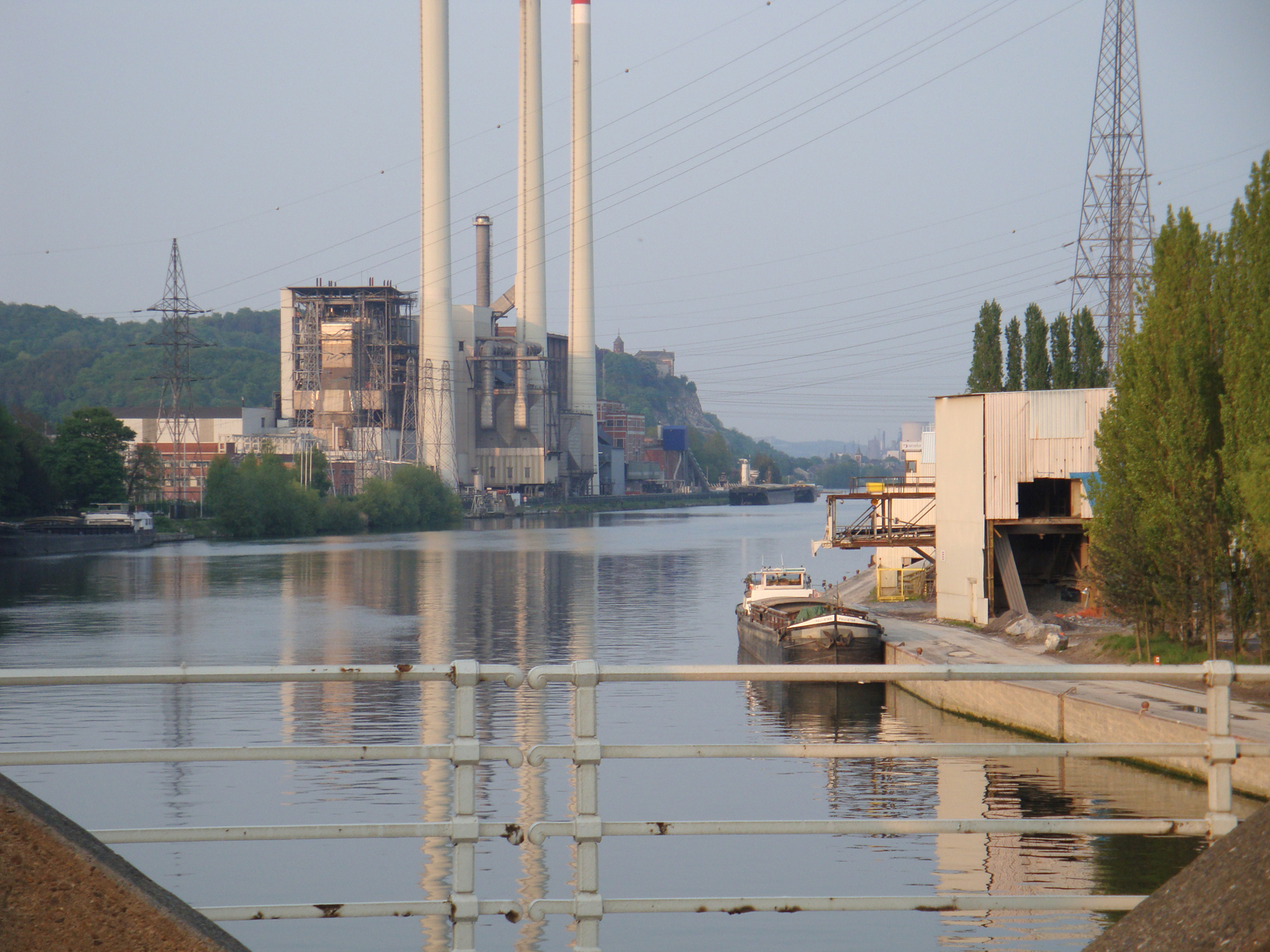 Maas nabij Engis en elektriciteitscentrale op linkeroever